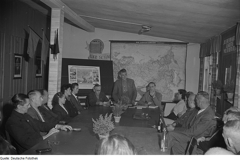 Original image description from the Deutsche Fotothek Einführungslektion mit Herrn Colditz